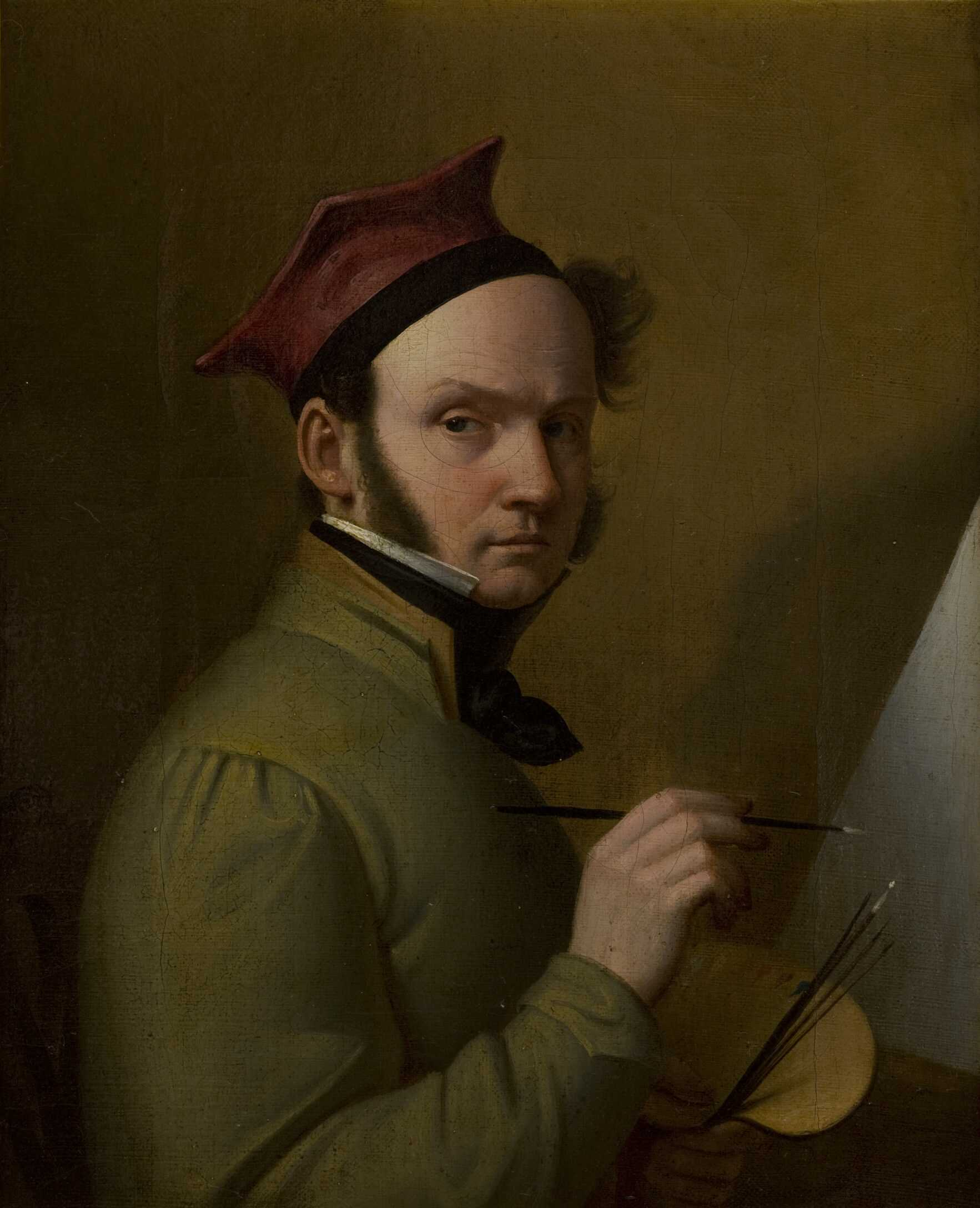 Self-portrait